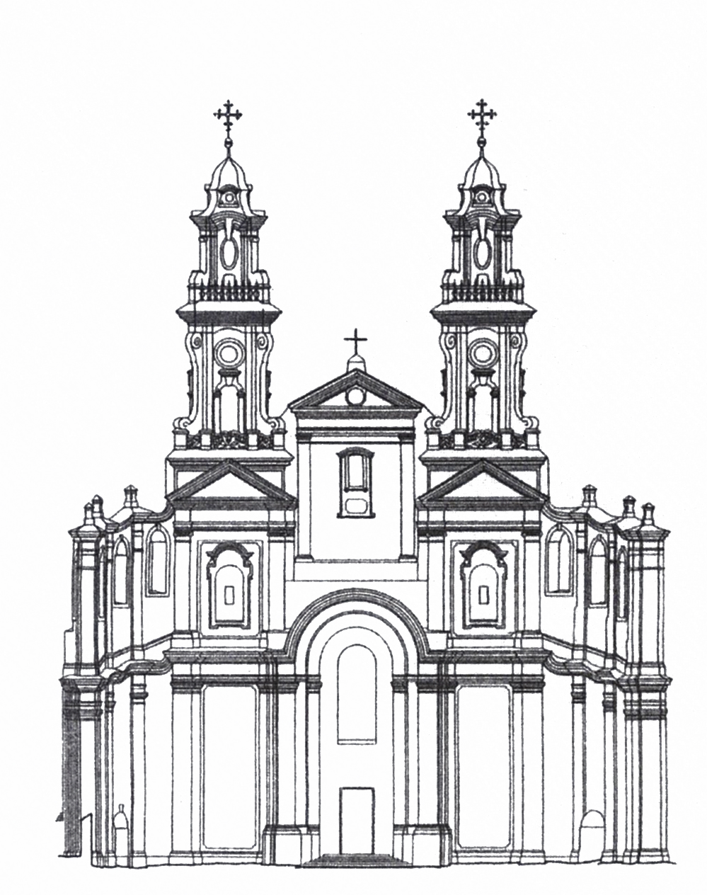 Беларуская (тарашкевіца): Пінск (Pinsk), пляц Рынак (plac Rynak). Сьвятога Станіслава і калегіюм езуітаў, абмеры